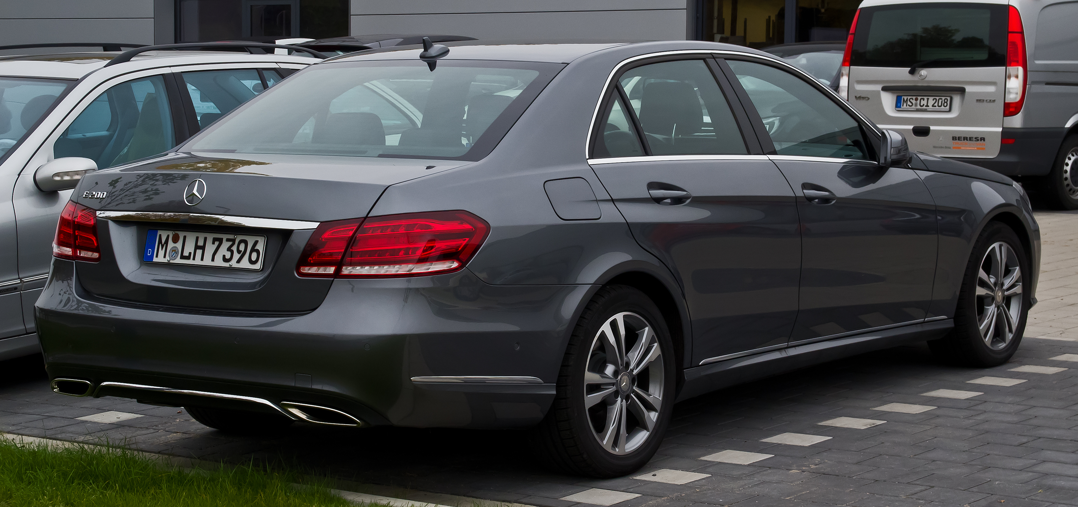 Mercedes-Benz E 200 Avantgarde (W 212, Facelift)